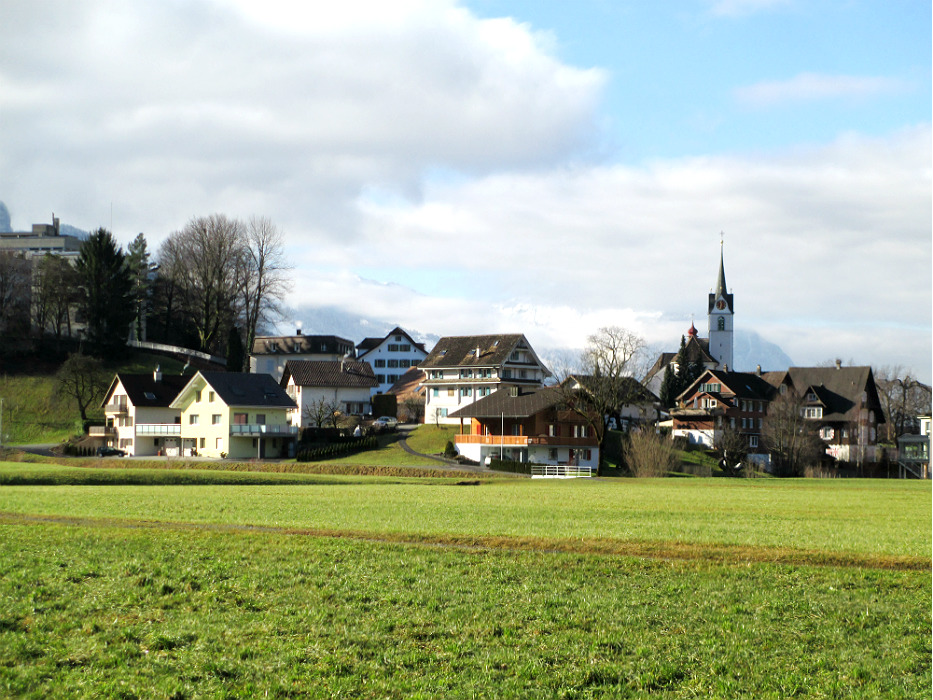 Ingenbohl. Blick von Osten.